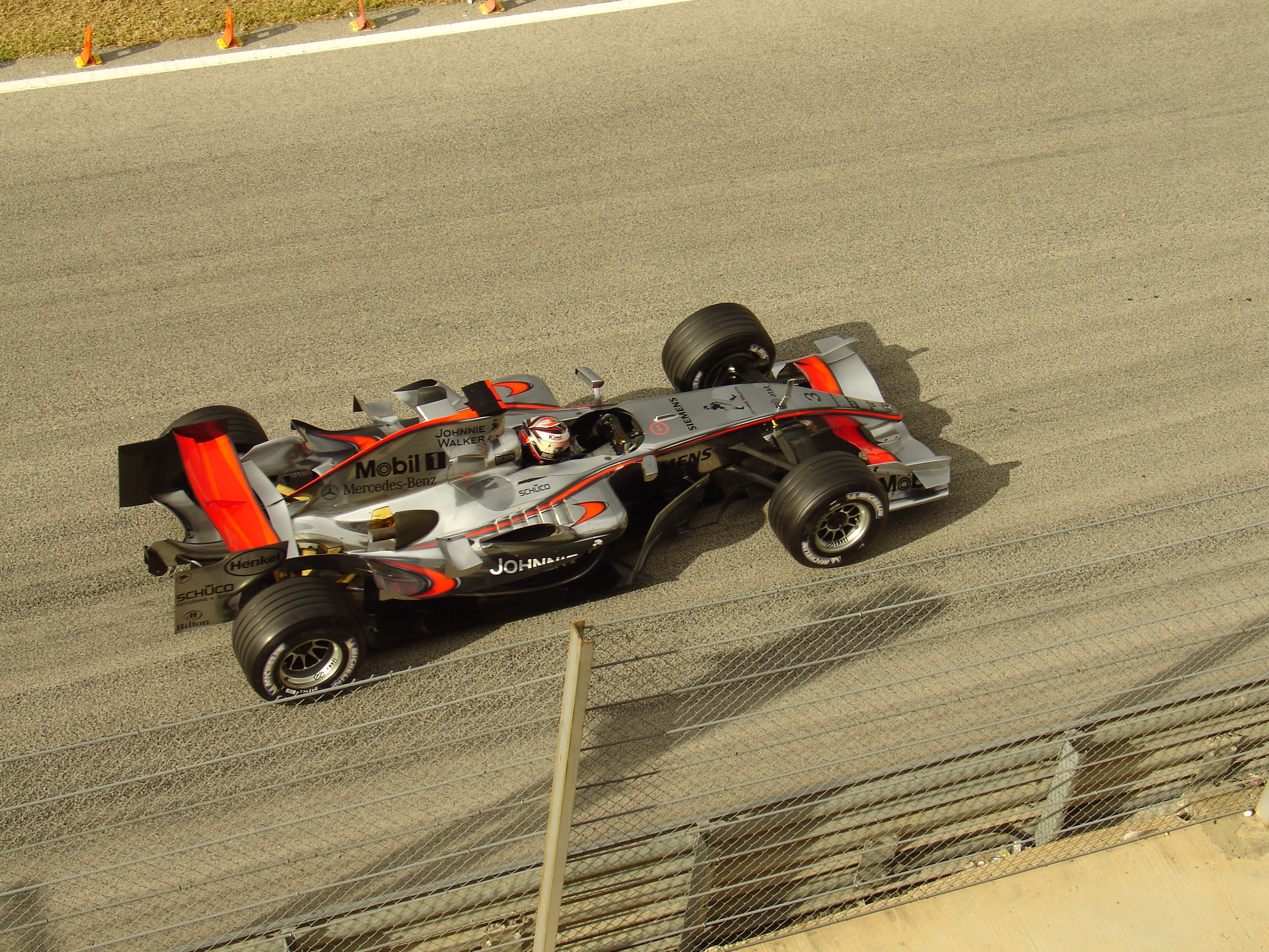 Kimi Raikkonen at Cheste Circuit (Valencia)